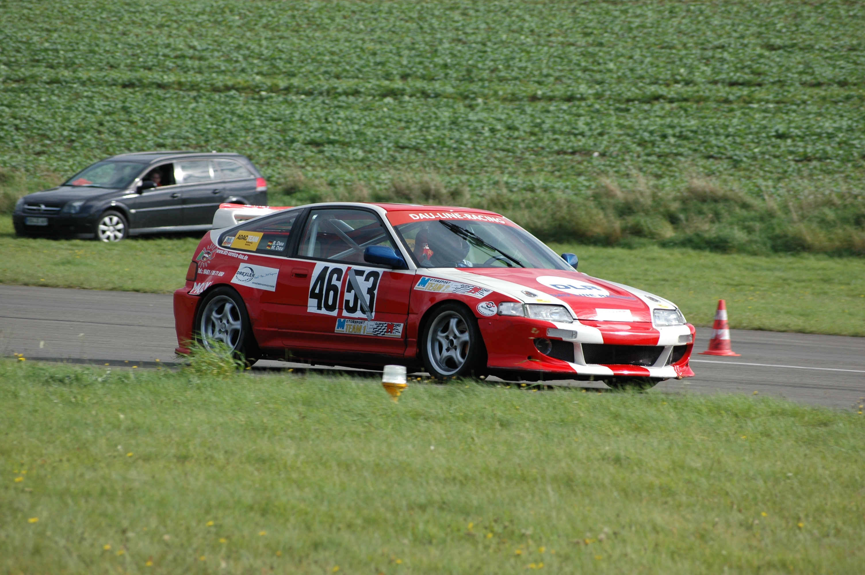 Slalom-Schüren_2010-10-03 12-43-53